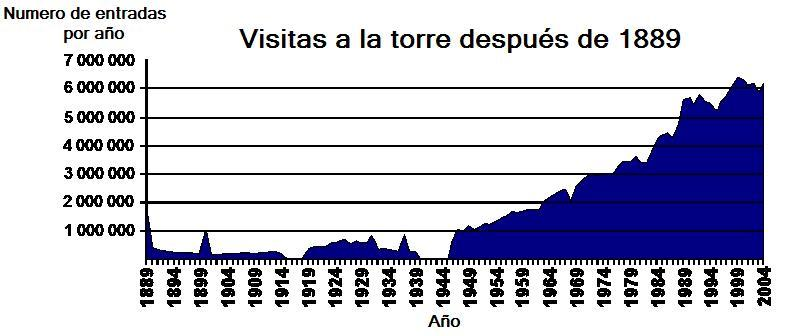 Grafico que muetsra las visitas a la Torre Eiffel, de 1889 a 2004; adpatado al español del mismo grafico en francés.